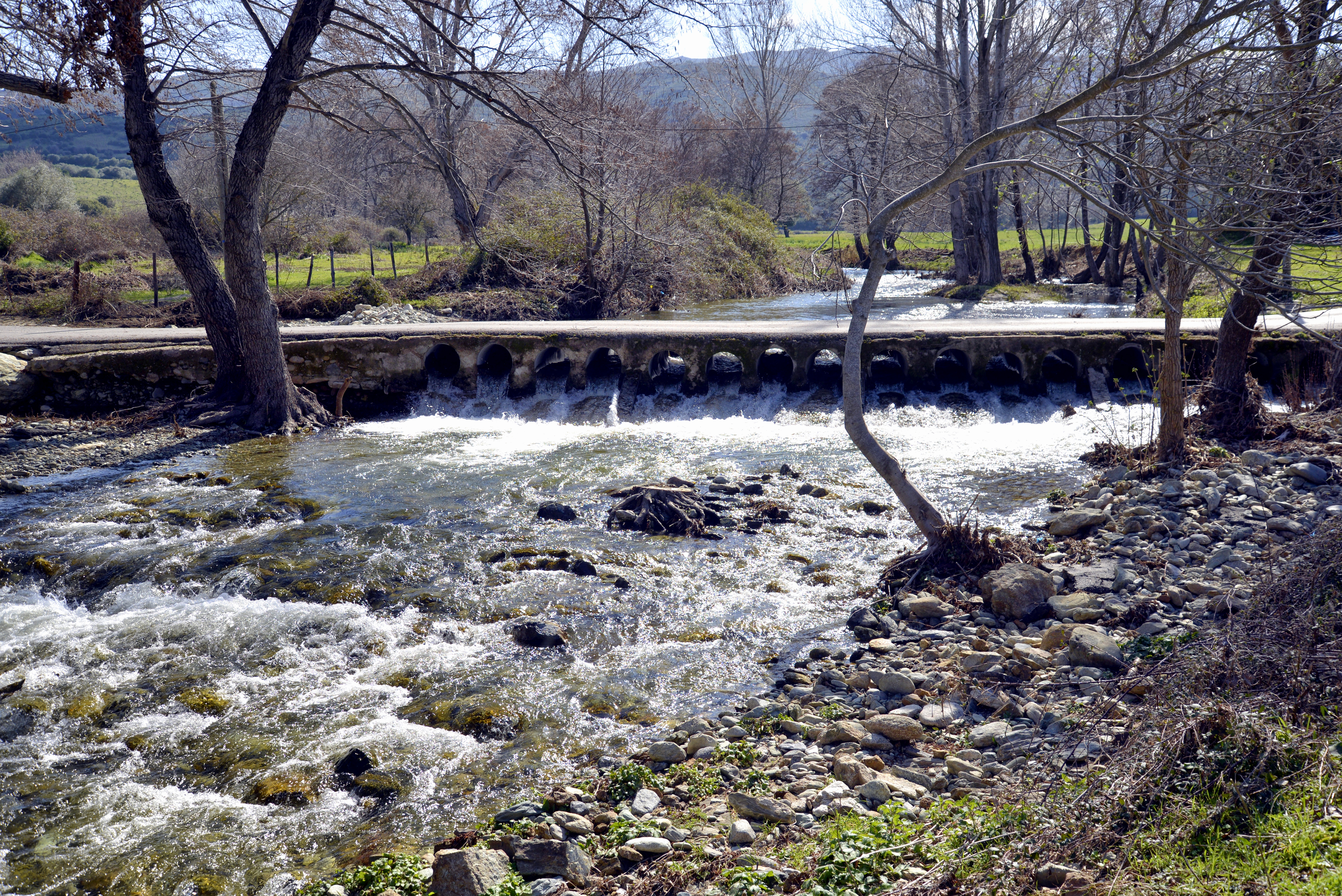 Piève, Nebbio (Corse) - Ouvrage (pont, gué ?) de Ghjuncaja sur l'Aliso